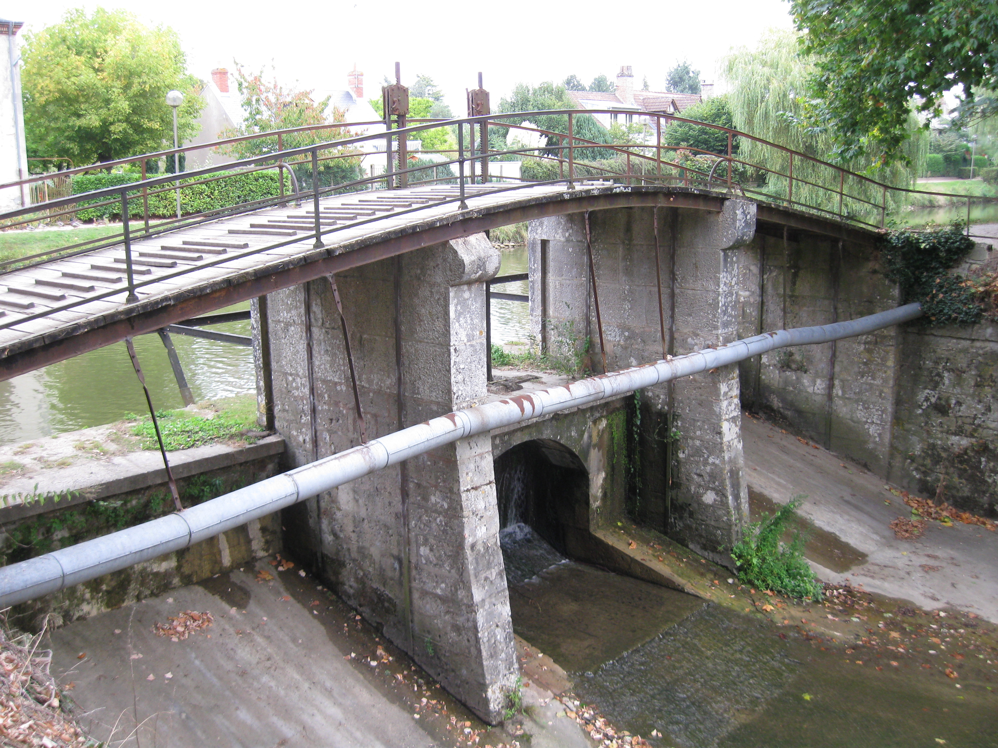 Déversoir sur le canal d'Orléans, Combleux, Loiret, France